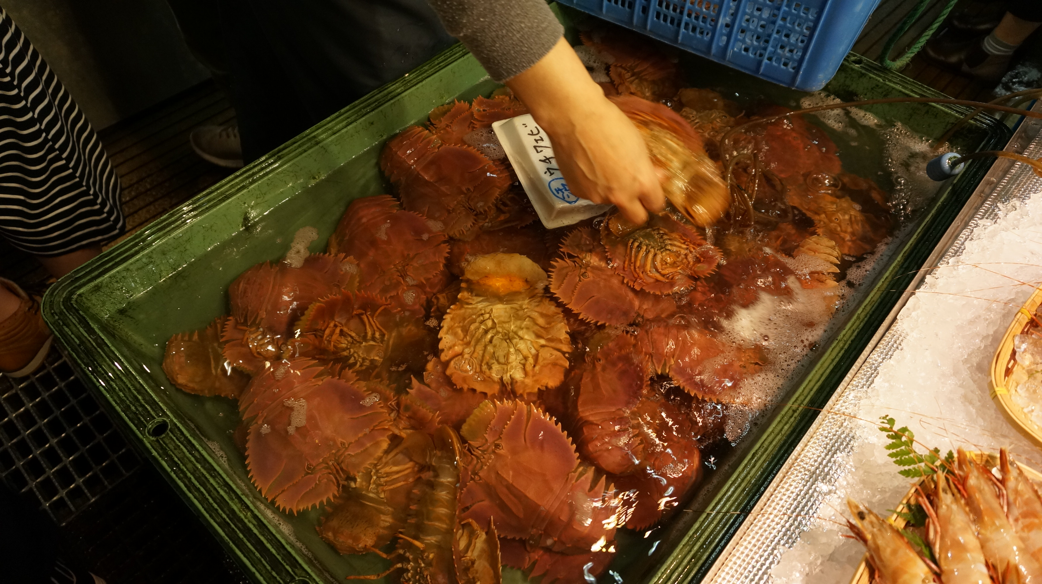 ウチワエビ(2017年5月下関市唐戸市場にて撮影)